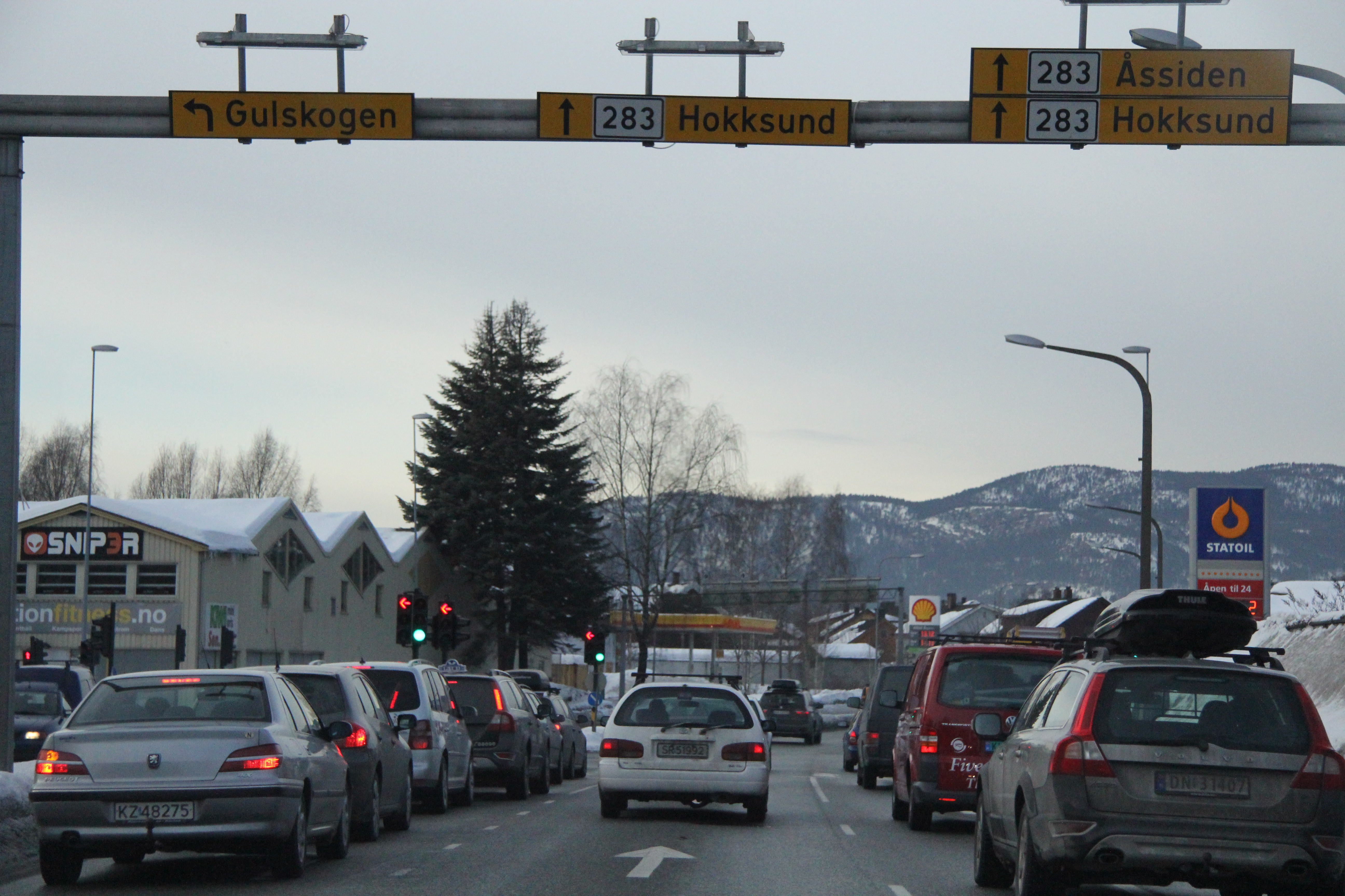 Åssiden